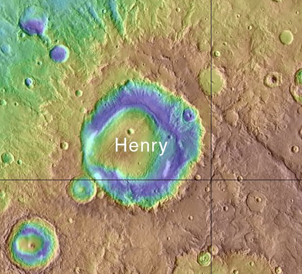 Cráter marciano Henry. (Imagen IAU/USGS/Goddard/A SU/USGS)